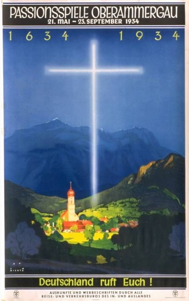 Plakat für die Passionsspiele Oberammergau 1934